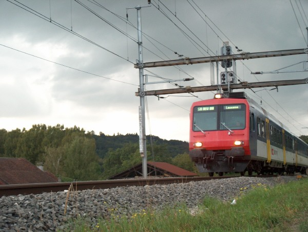 By Alexandre Frauenknecht, September 2005